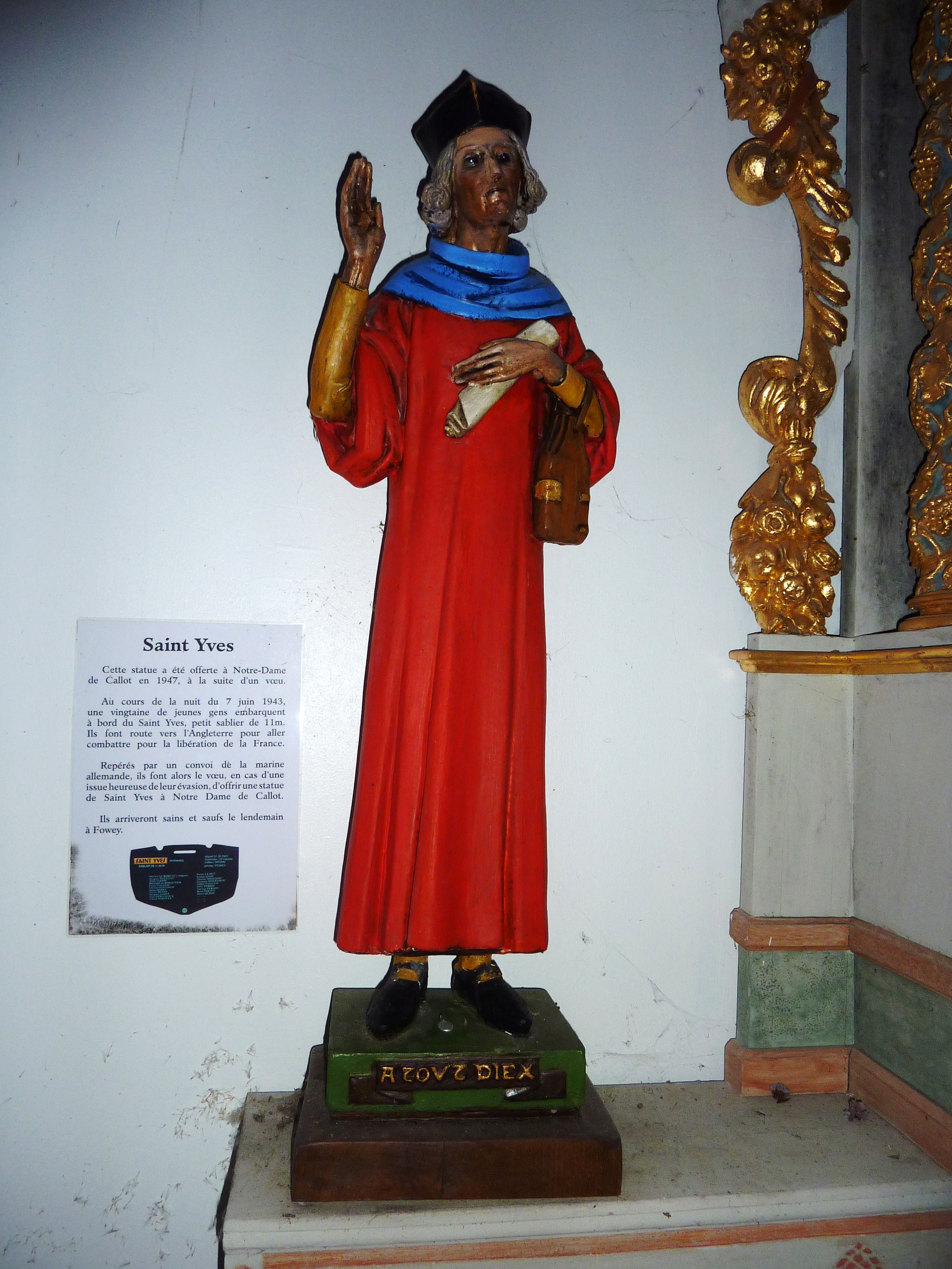 Carantec : chapelle de l'île Callot, statue ex-voto de saint Yves